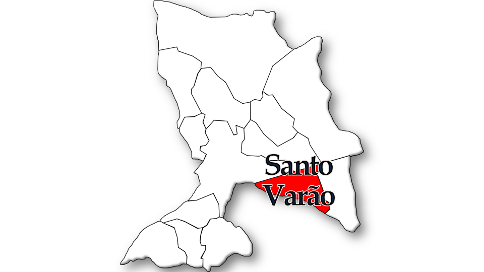 População